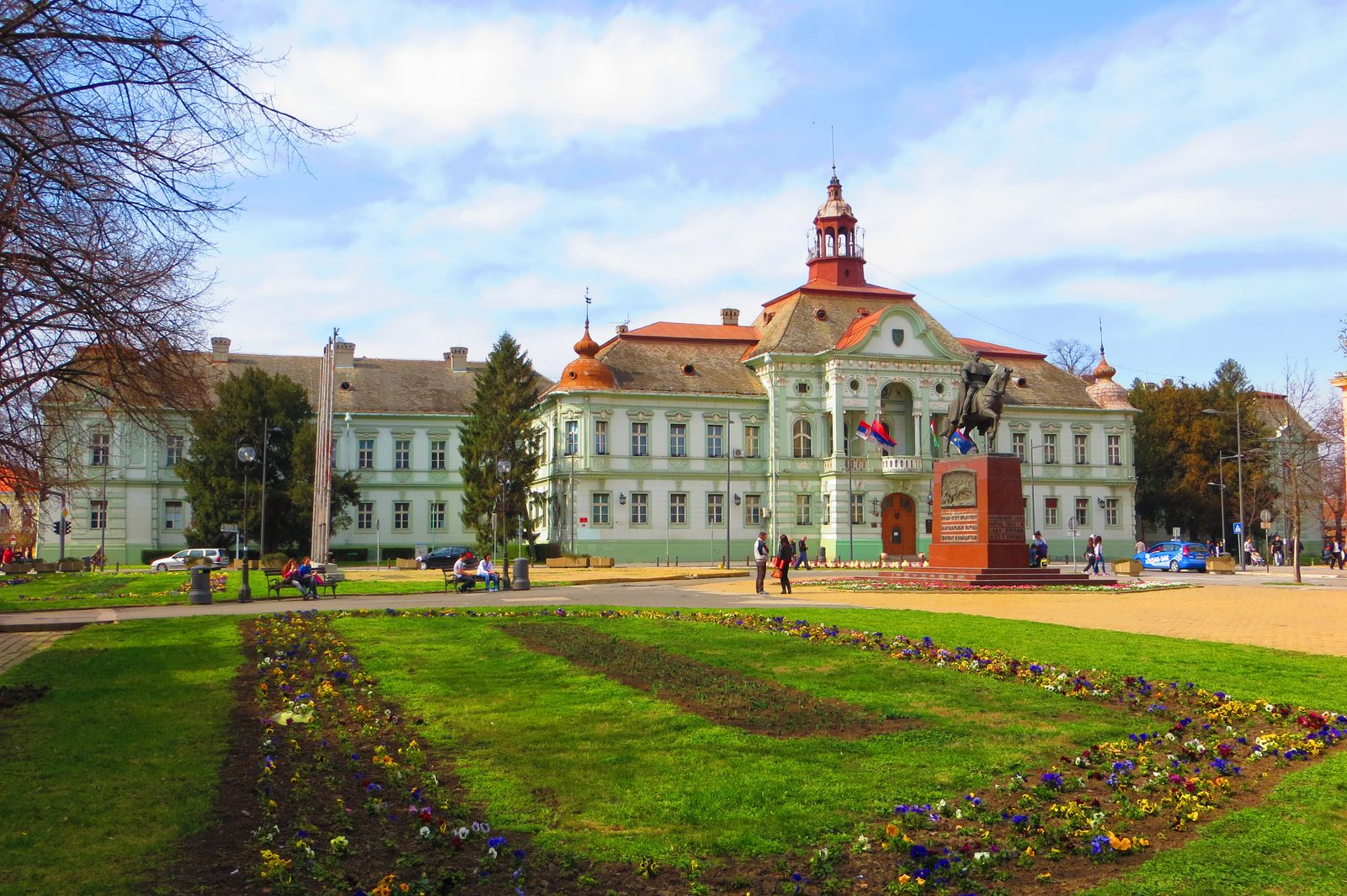 Trg slobode